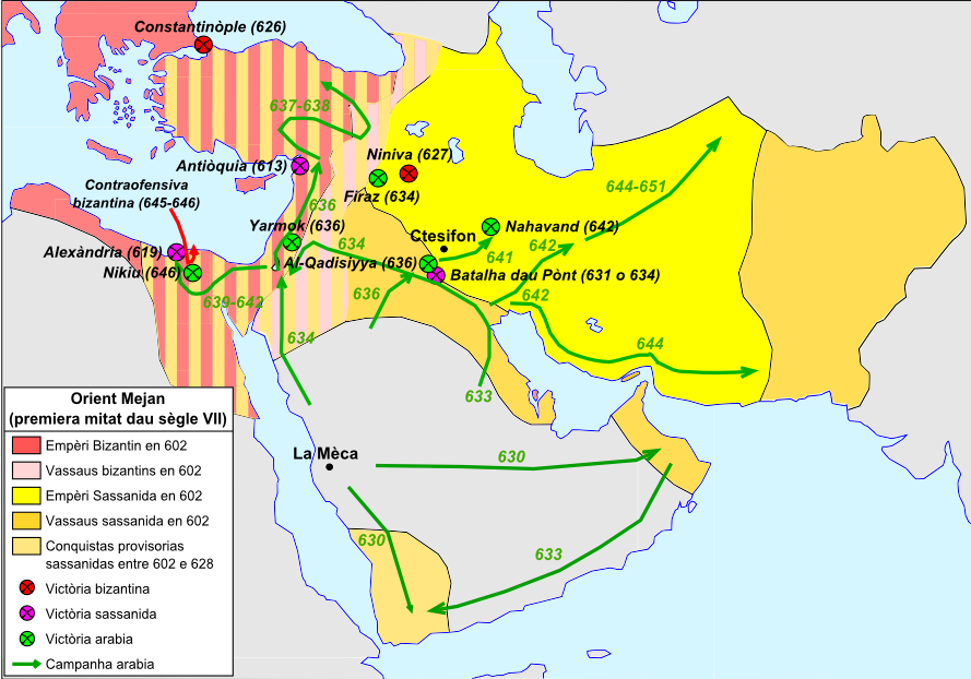 Evolucion de l'Orient Mejan durant la premiera mitat dau sègle VII.